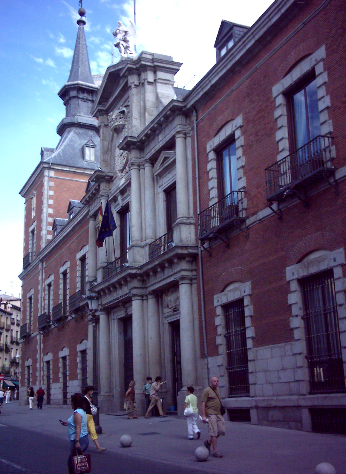 Balacio barroco de Santa Cruz. Siglo XVII, actual Ministerio de Asuntos Exteriores. Madrid, España. Baroque Palace of Santa Cruz, today Ministery of Foreign Affairs. Madrid, Spain.